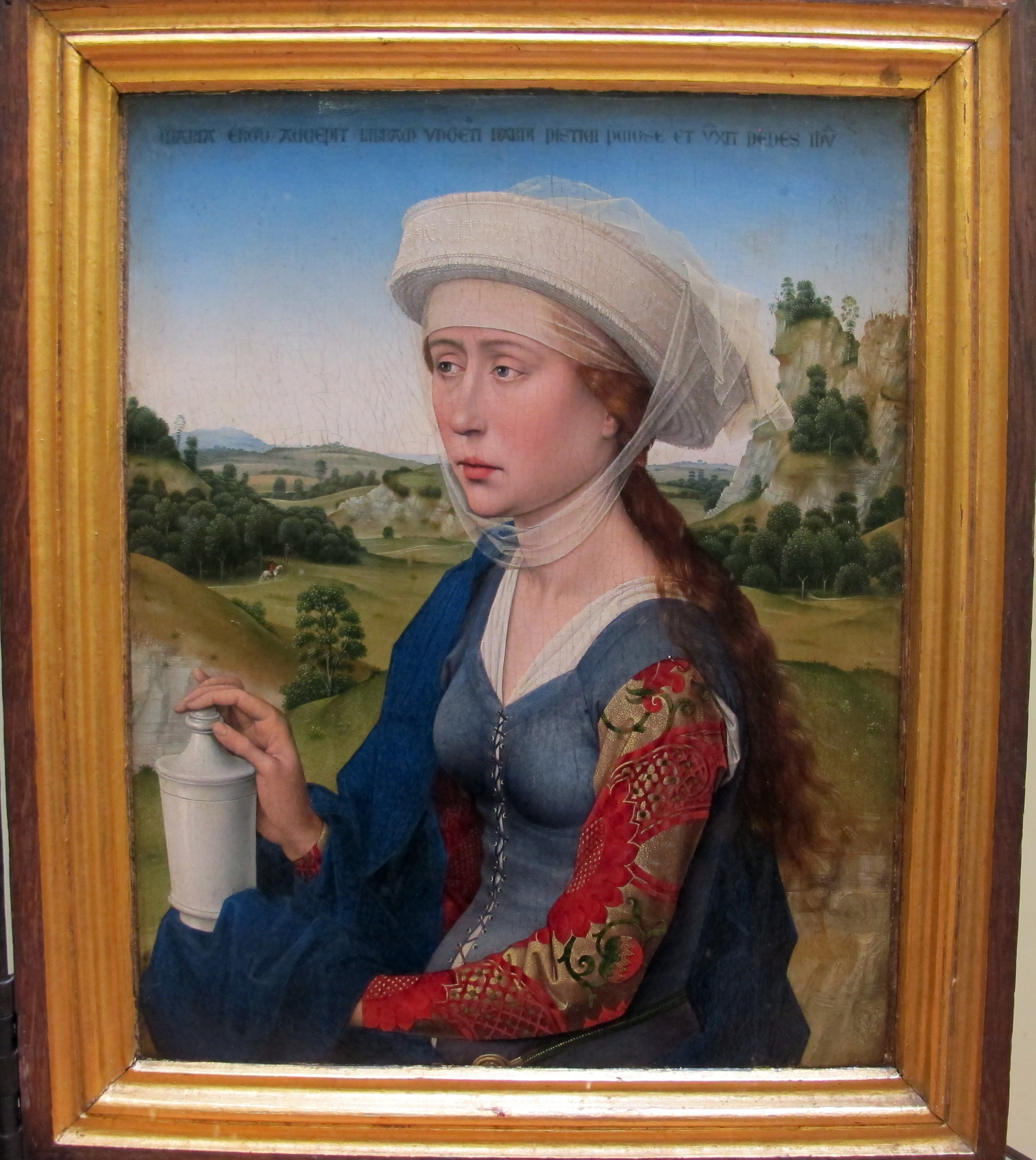 Pittura fiamminga al Louvre, Parigi